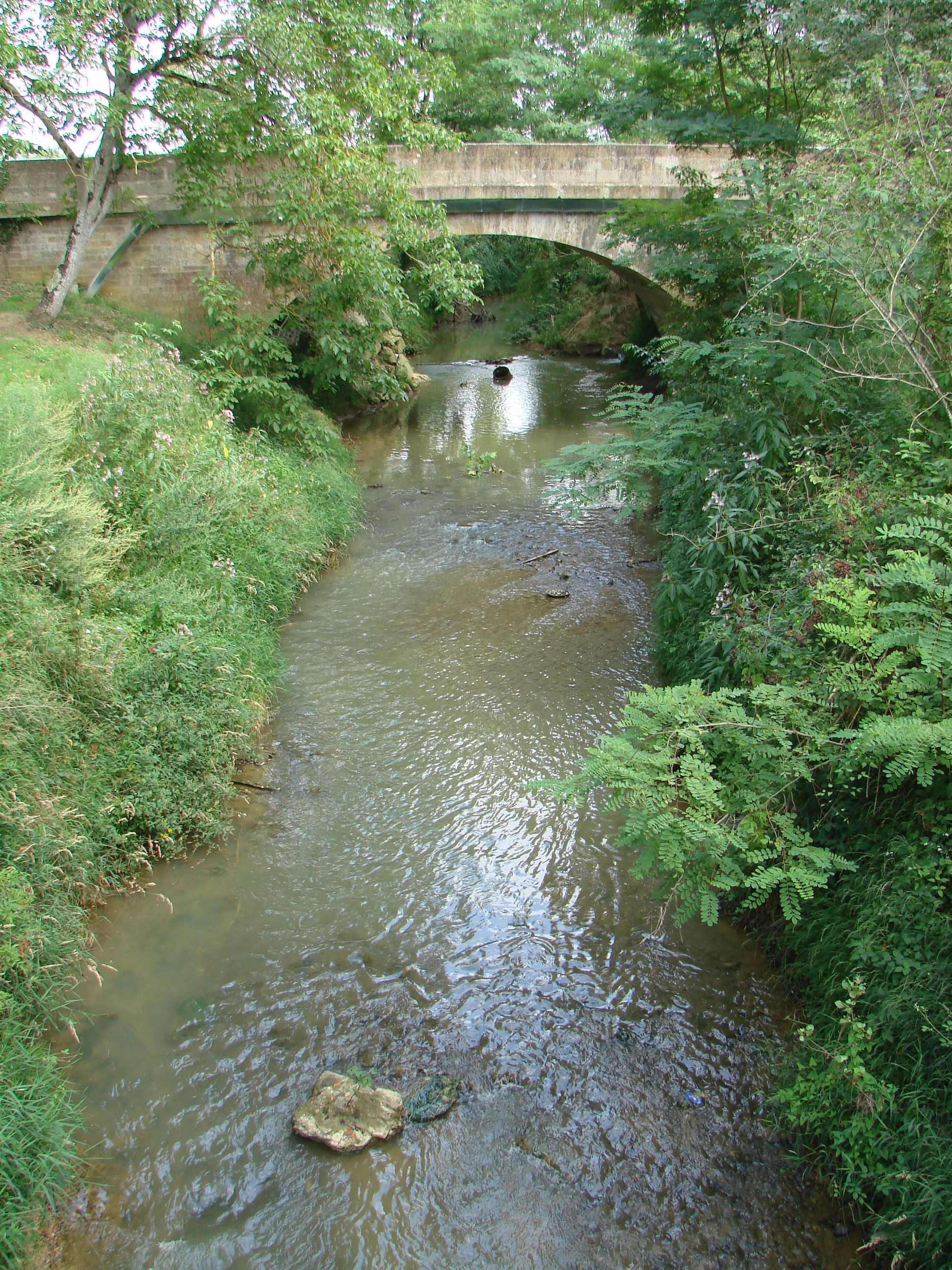 Village de Marciac dans le Gers (France) : rivière Bouès à Marciac